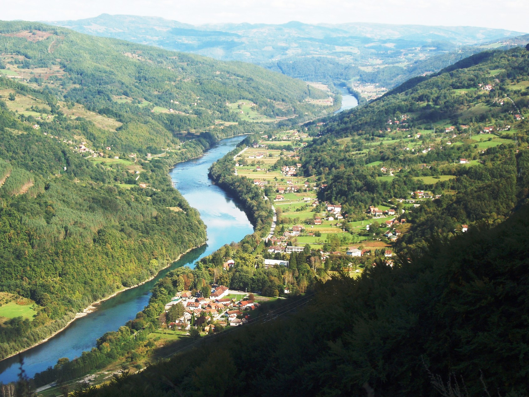 Перућац и Дрина